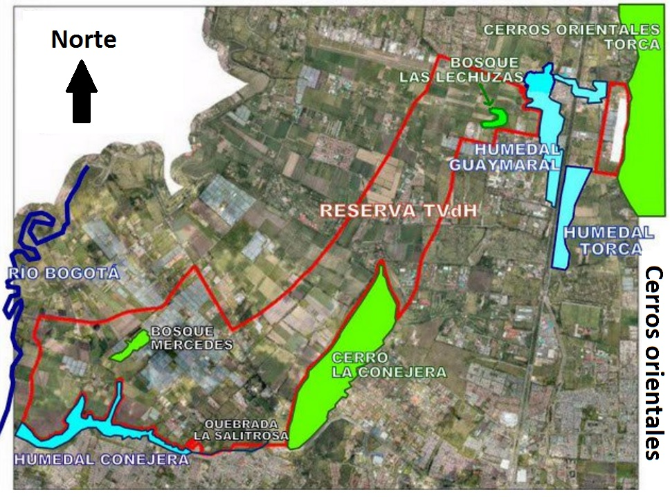 Zona de la Reserva Thomas van der Hammen delimitada en el borde norte de Bogotá